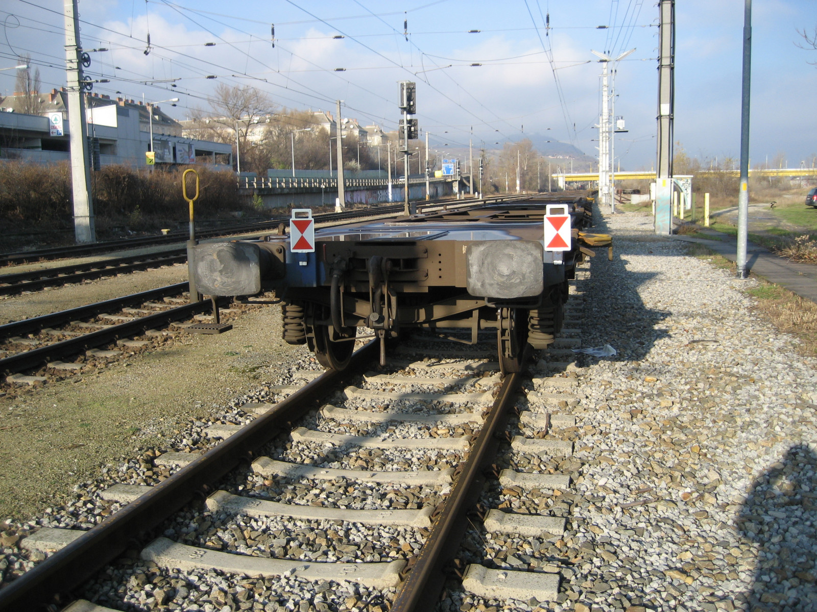 Gueterwagen mit deutschen Zugschluss-Signalen